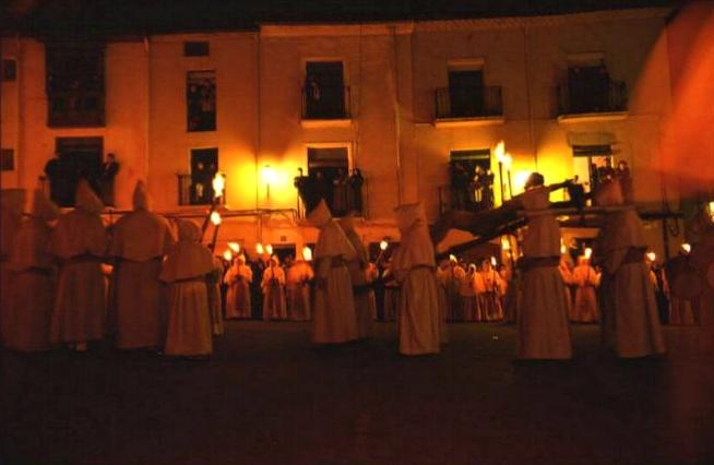 Semana Santa: Hermandad Penitencial del Stmo. Cristo de la Buena Muerte (Zamora)